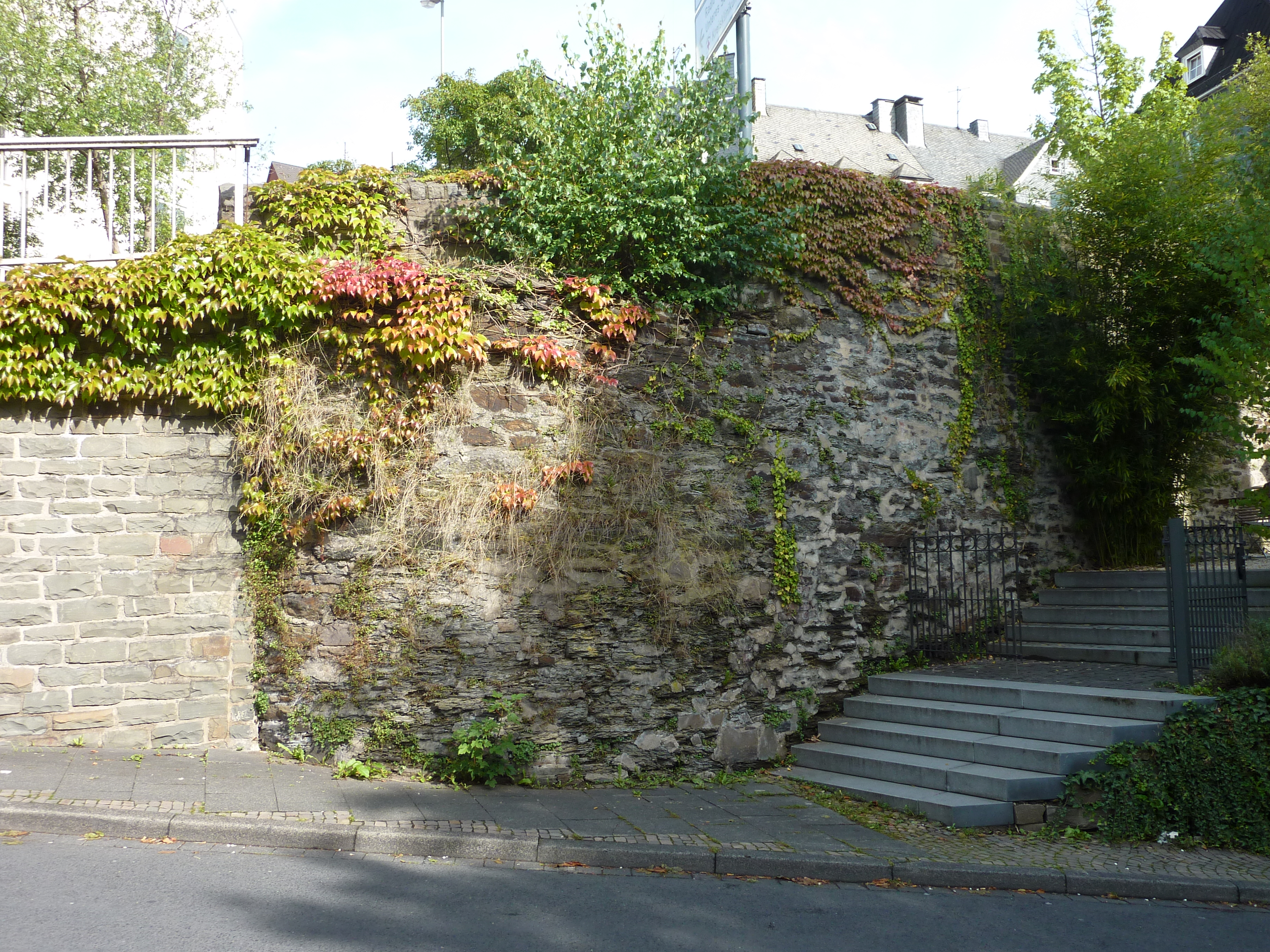 Historische Stadtbefestigung in Siegen, Nordrhein-Westfalen, Bundesrepublik Deutschland: Mutmaßlicher Rest eines Turms des Löhrtores, südliches Tor der mittelalterlichen Stadtbefestigung